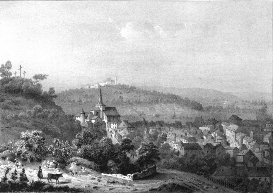 Album du Dauphiné - tome IV, litographie de La Tour-du-Pin